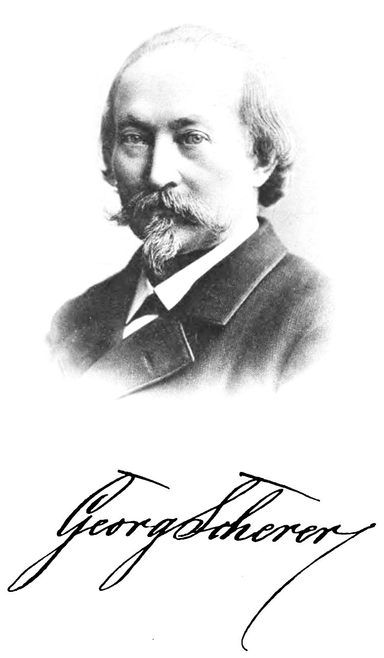 Georg Scherer. In: Gedichte. 4. vermehrte Auflage. Stuttgart u.a.: Deutsche Verlags-Anstalt, 1894